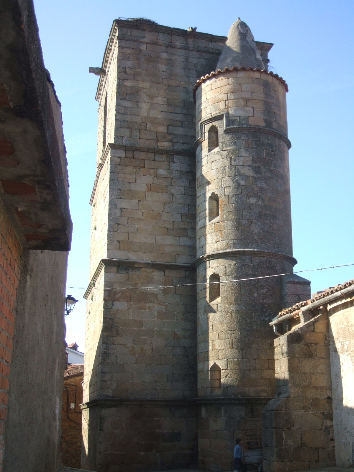 En Villanueva de la Sierra (Cáceres) la torre de la iglesia presenta adosada una segunda torre cilíndrica para la escalera de caracol. Probablemente el arquitecto Pedro de Ibarra participó en la fábrica de este campanario.